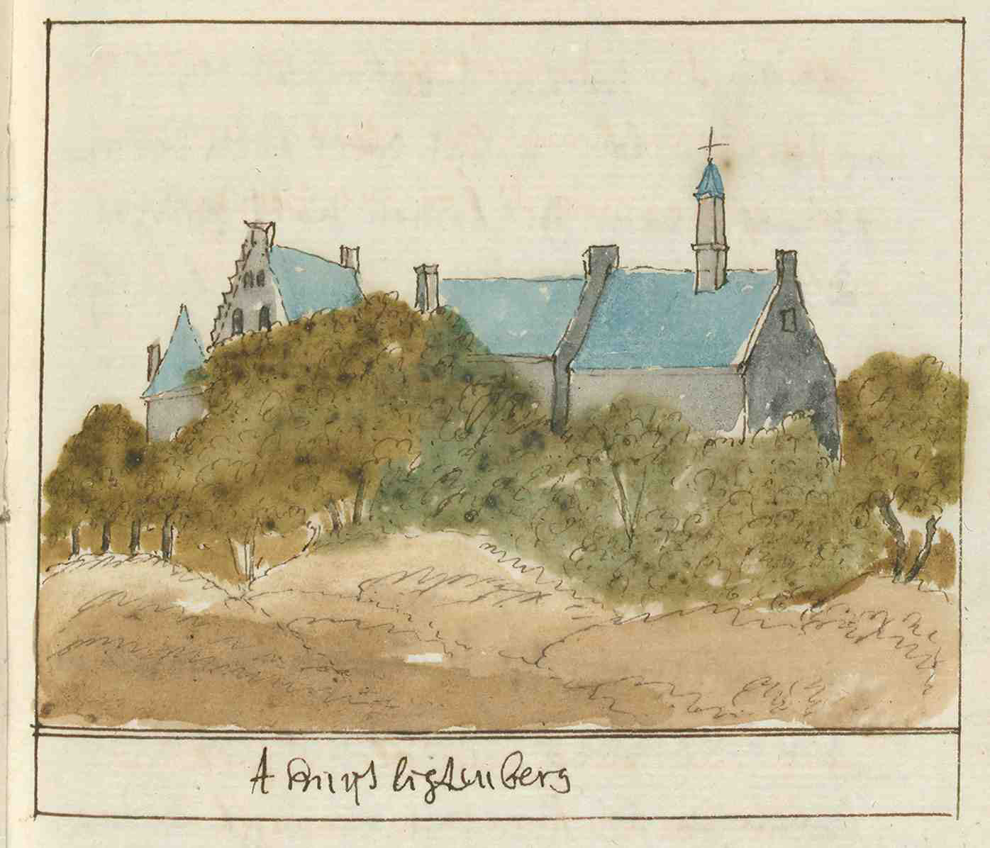 Beschrijving van Gelderland door Schoemaker. Hier: Kasteel Lichtenberg op de St-Pietersberg bij Maastricht.